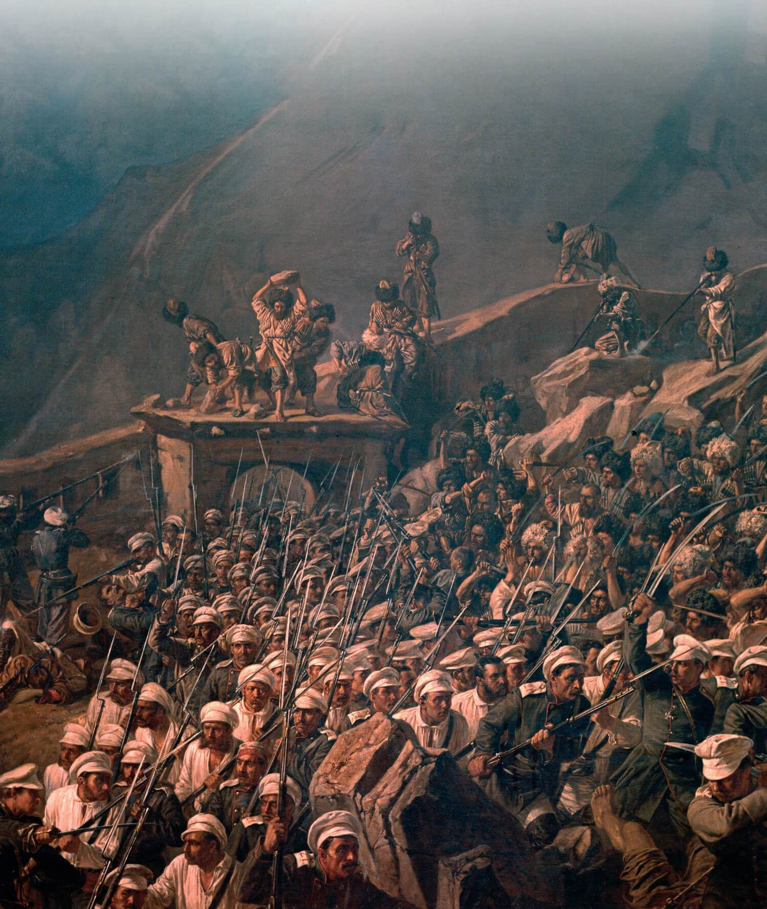 Грузинский Пётр Николаевич. Штурм Гуниба. 1862 год. Холст, масло